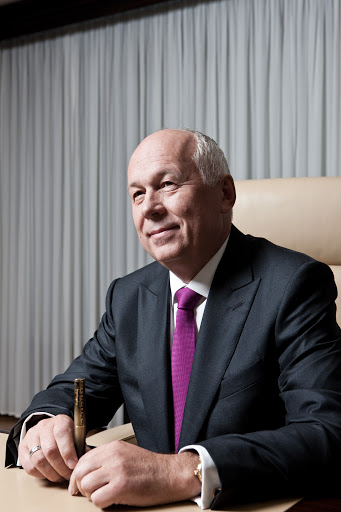 Чемезов